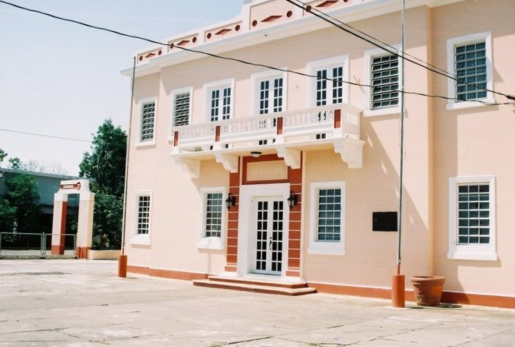 Alcaldía de Arroyo, Arroyo-barrio pueblo, Puerto Rico